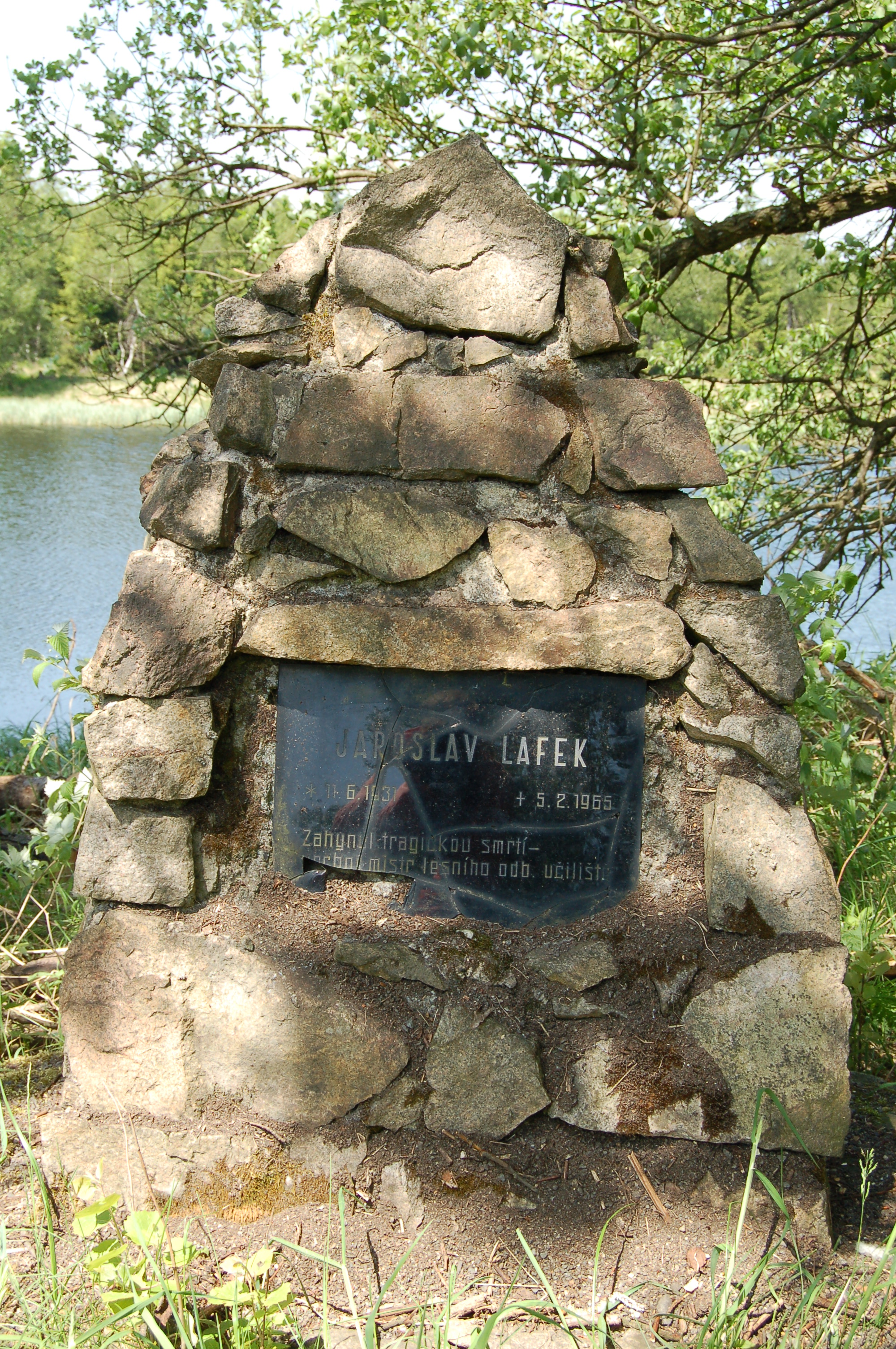 Česky: Přírodní rezervace Černý rybník v okrese Most